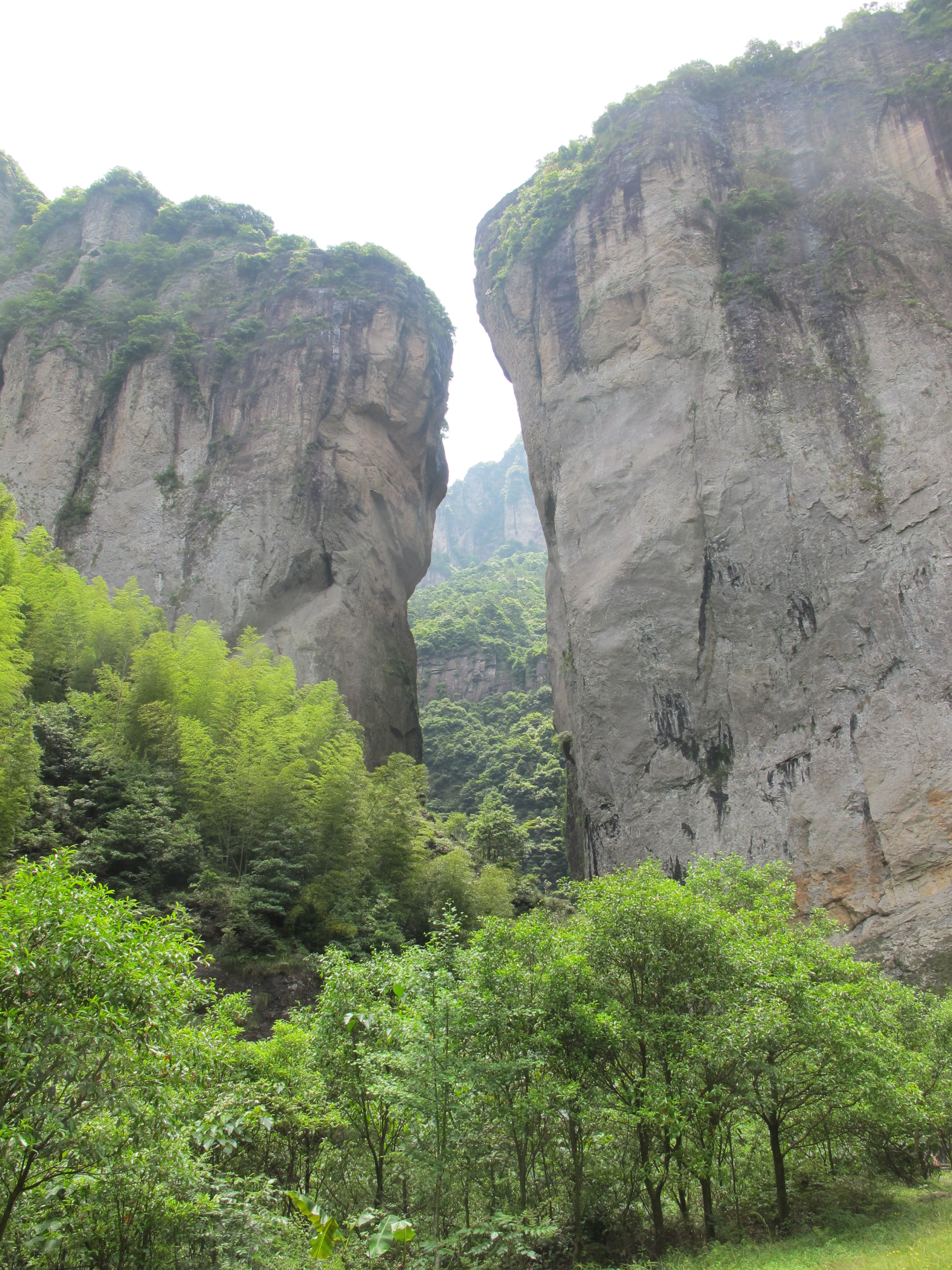 雄伟的显圣门